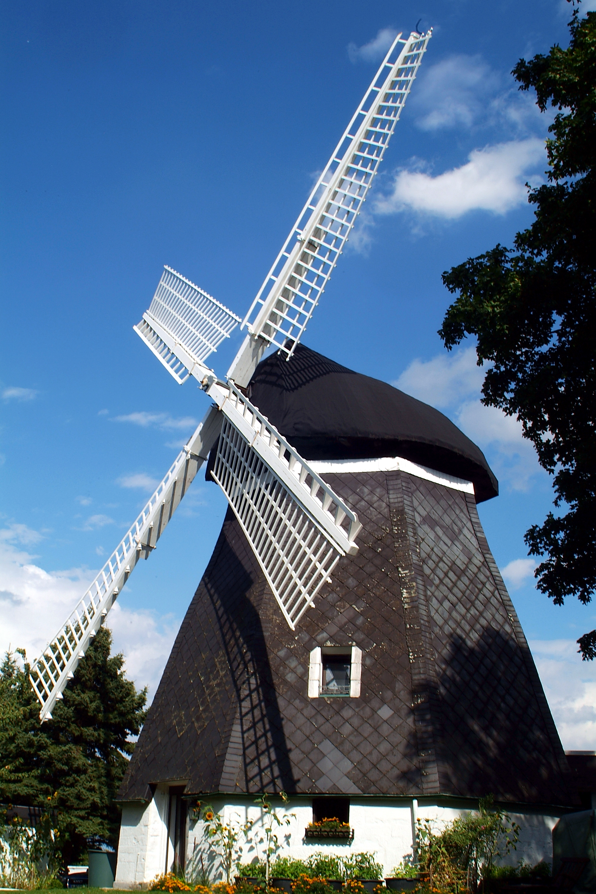 Die denkmalgeschützte Holländer-Windmühle unter der Adresse Zur Mühle 33 ...